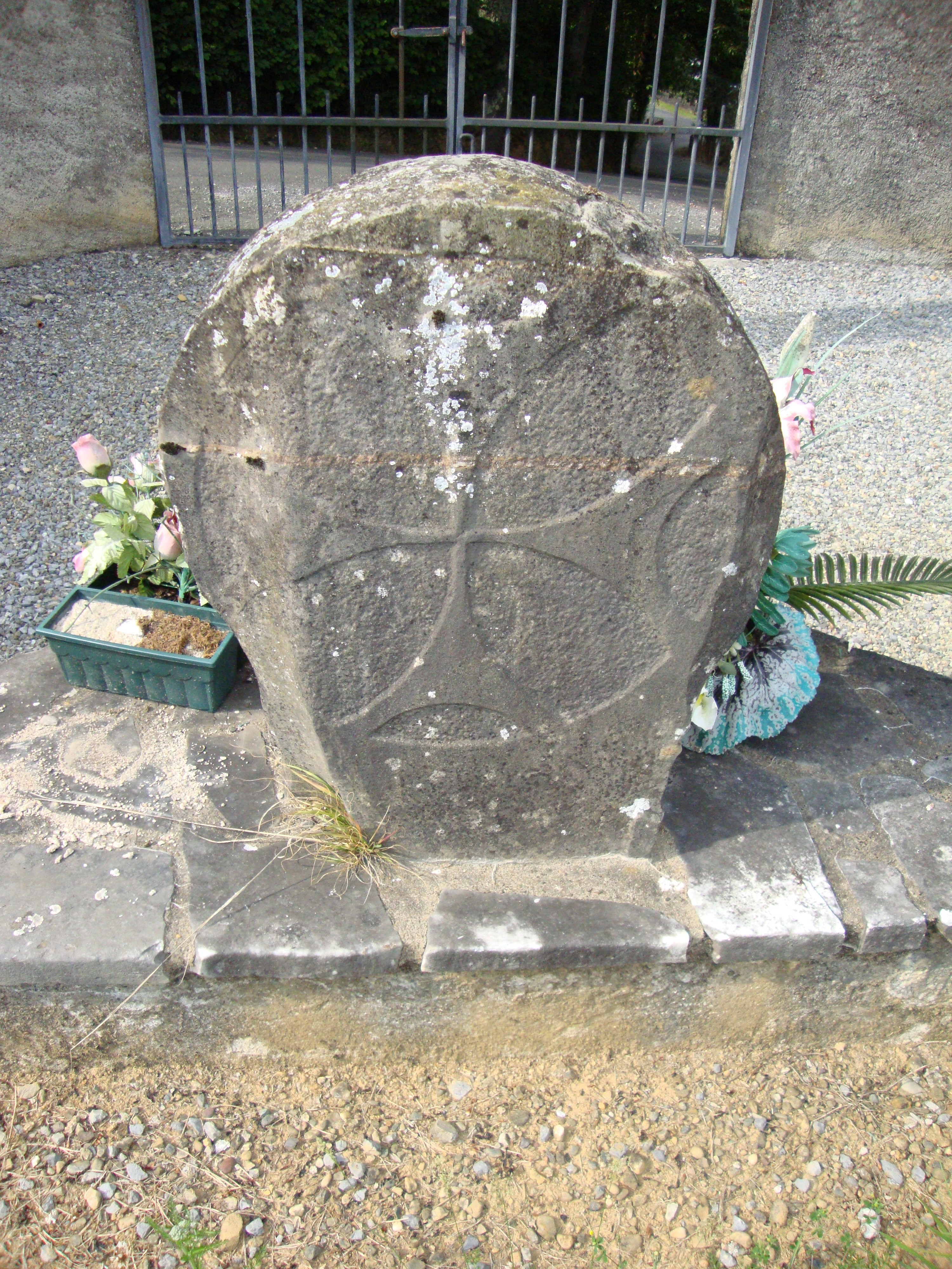 Féas (Pyr-Atl, Fr) discoïdal stele